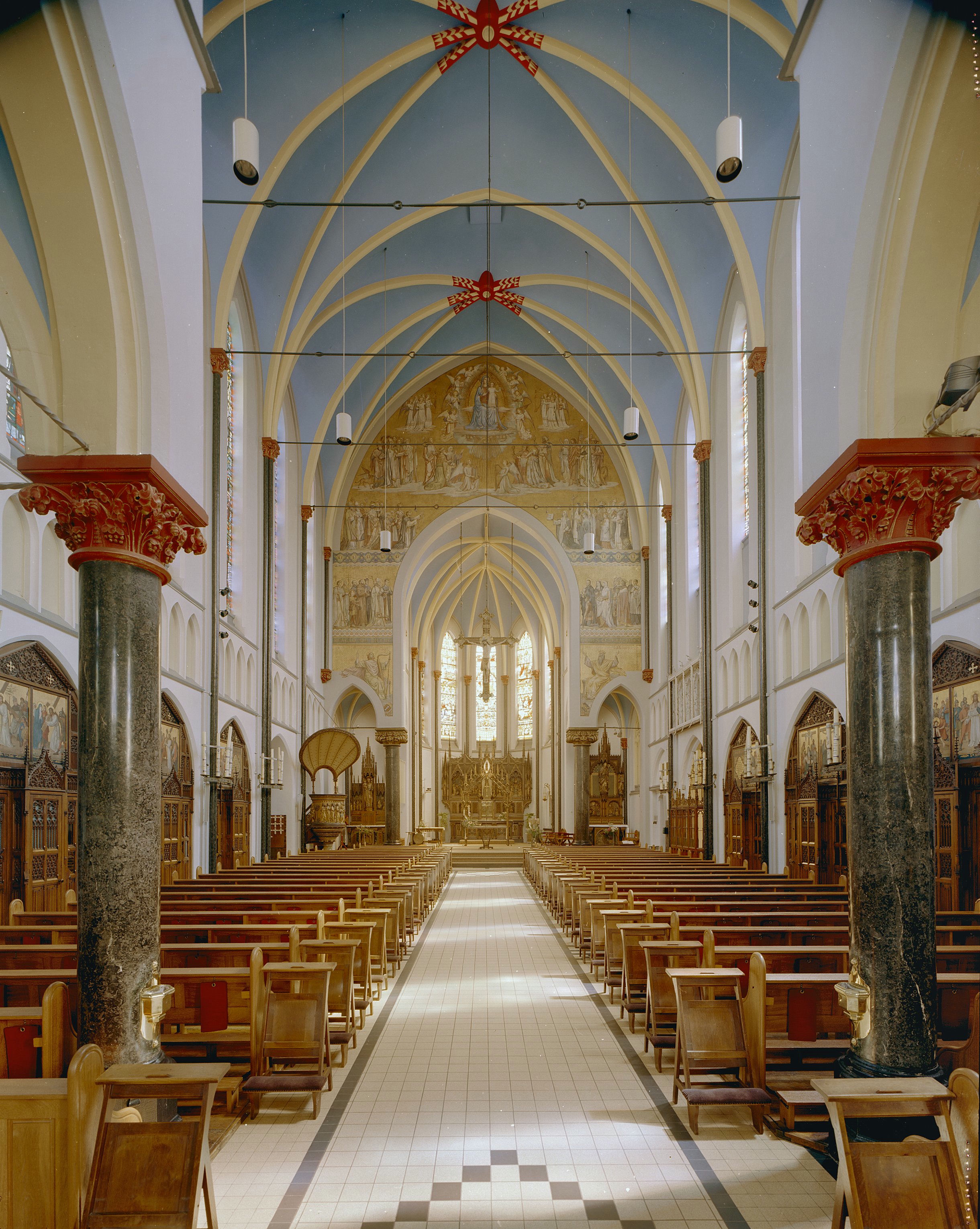 Kruiswegpark: Interieur, kapel, overzicht naar het oosten